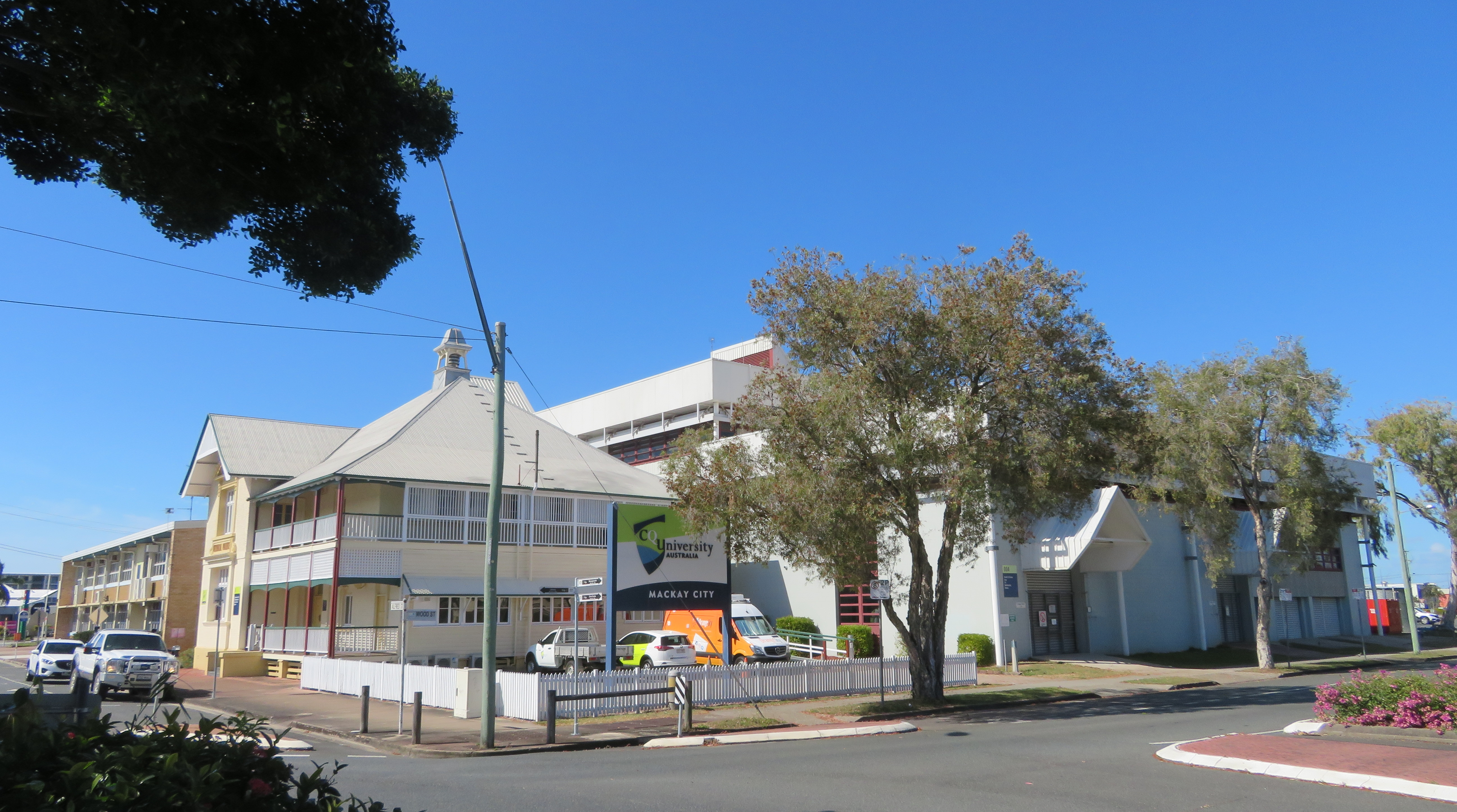 Mackay University, Australien